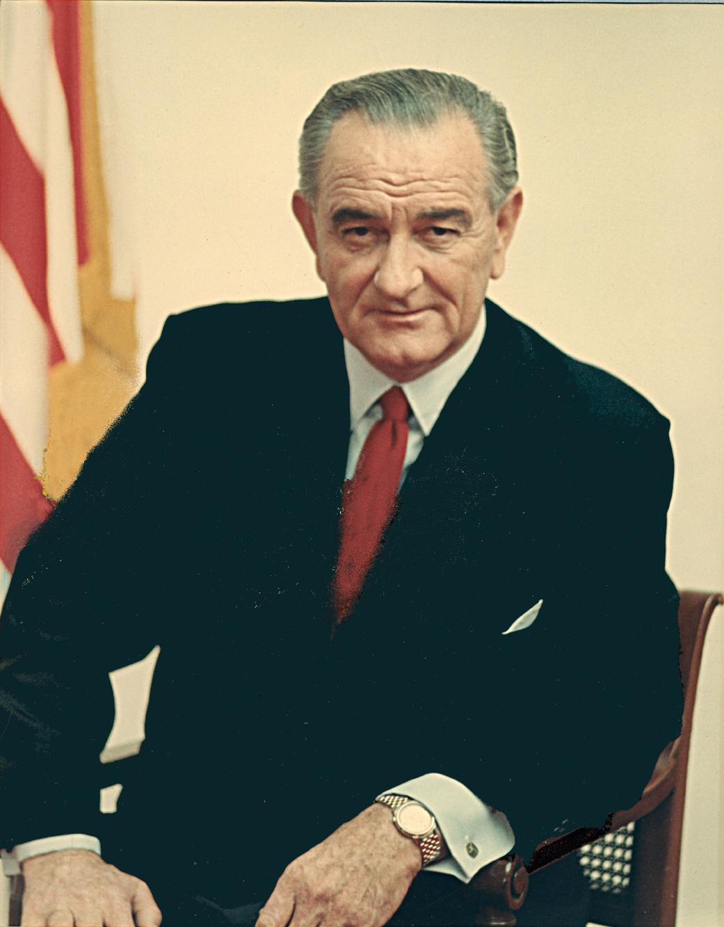 Foto del Presidente Lyndon B. Johnson felicitando la Navidad del año 1967 al political cartoonist Joaquin de Alba.